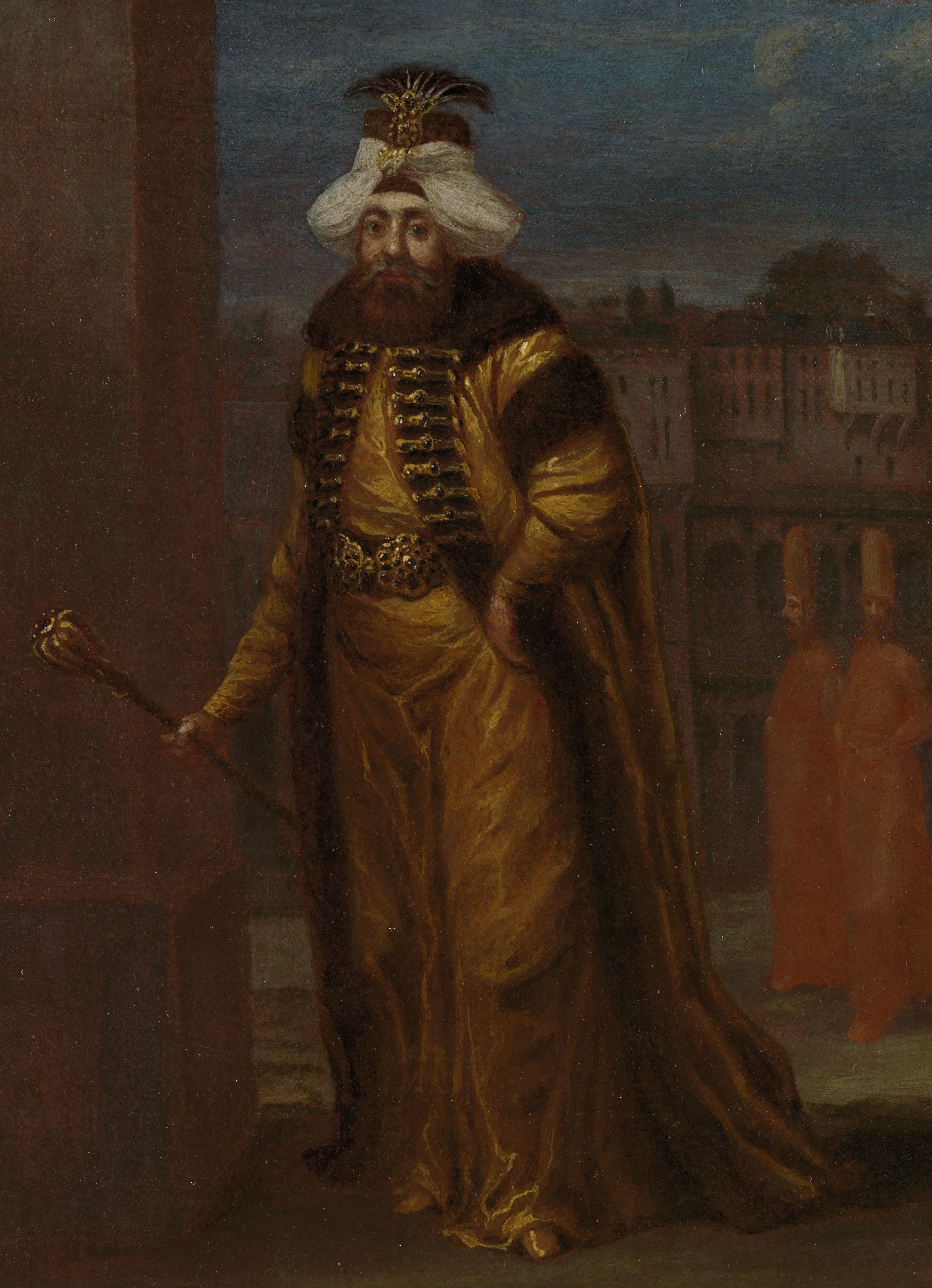 De sultan is geportretteerd in de open lucht vergezeld door twee dienaren. Op de achtergrond zien we enkele gebouwen. Mogelijk moet dit het haremgedeelte van het paleis van de sultan, het Topkapı Sarayı, voorstellen. Ahmed III draagt een met bont gevoerde kaftan en een tulband die kâtibî wordt genoemd. Dit type tulband was gedrapeerd rondom een plat hoofddeksel en versierd met een waaiervormig sieraad. Ook de ceintuur van de sultan is rijk bezet met juwelen, evenals de ceremoniële staf die hij in zijn rechterhand vasthoudt. Staande, ten voeten uit, scepter in de rechterhand. Op de achtergrond twee volgelingen voor het paleis.